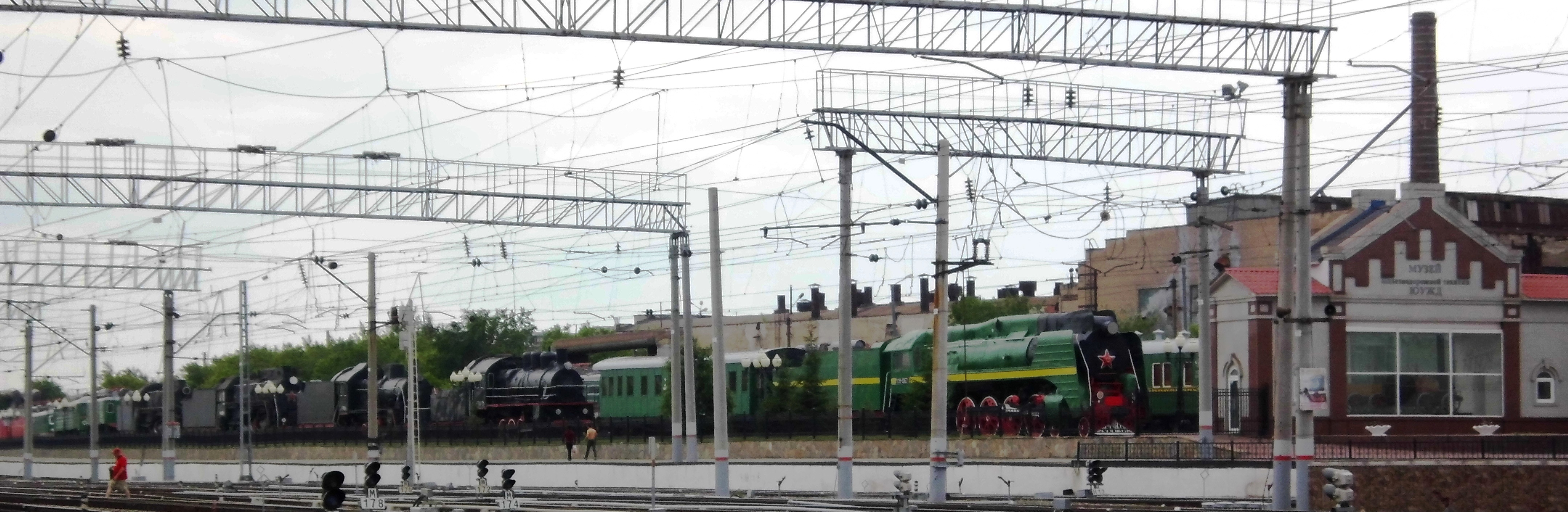 Музей железнодорожной техники ЮУЖД в Челябинске. Экспонаты.